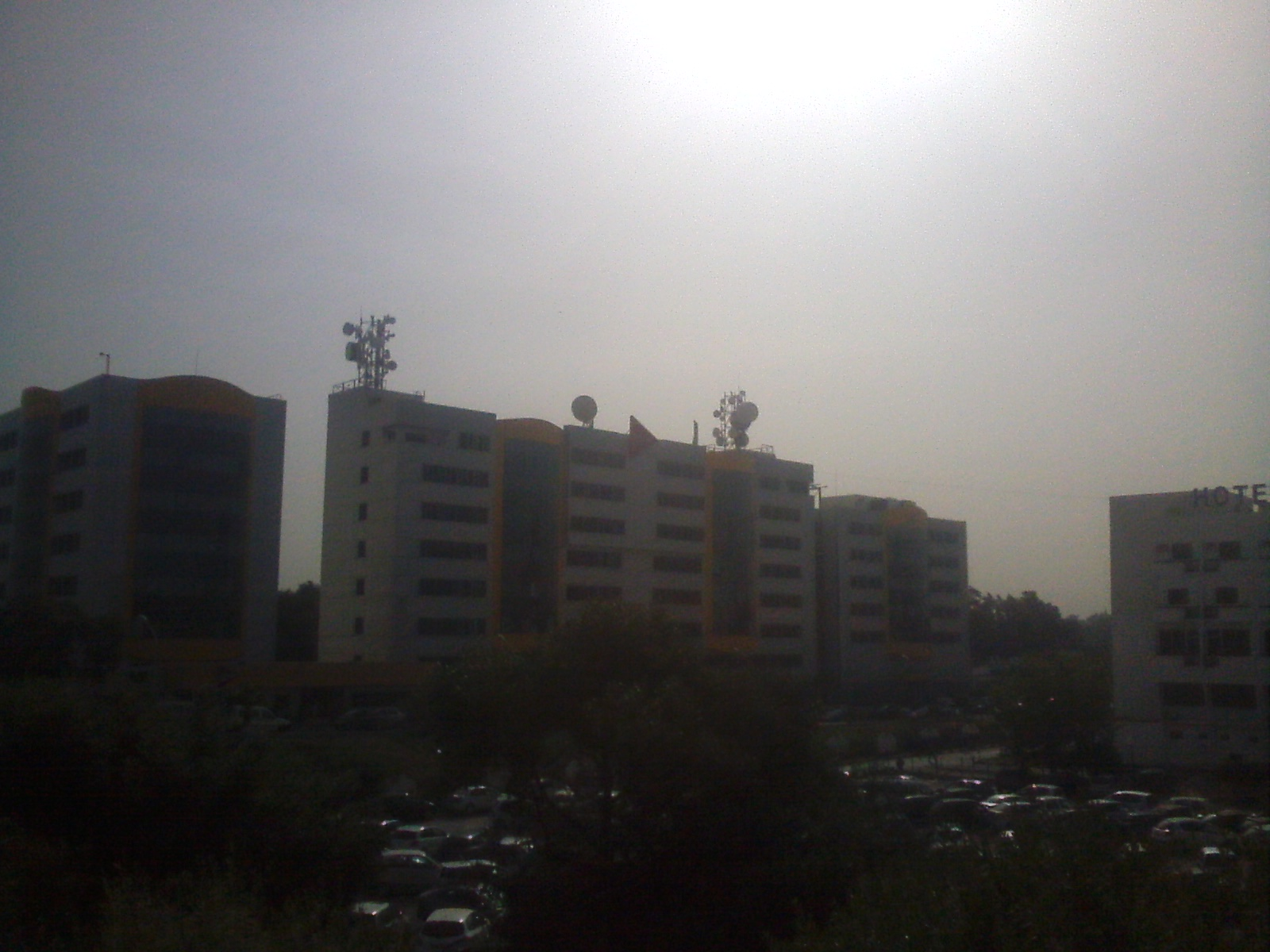 Siège de la société DJEZZY à Dar El Beida, Alger, Algérie